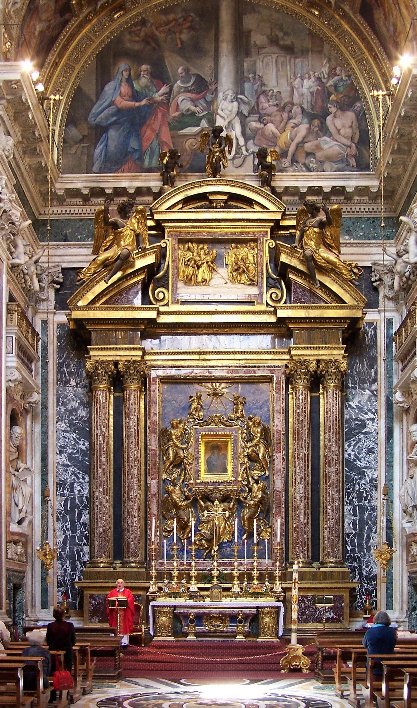 Santa Maria Maggiore - Hauskapelle der Familie Borghese - Ikone Maria Salus Populi Romani